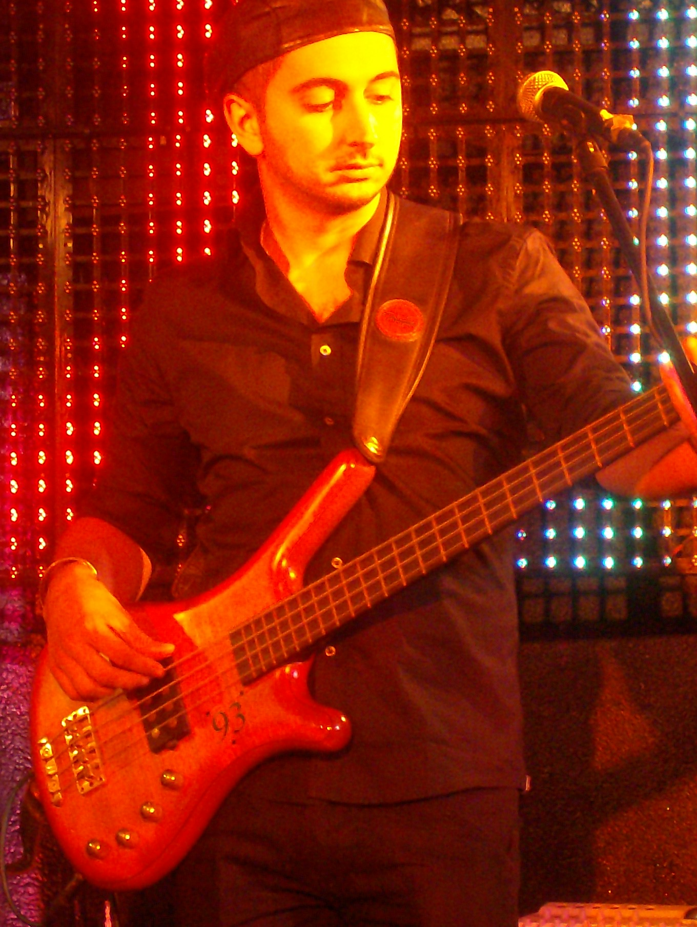 Demian Recio durante un concierto de Ô Paradis en la Sala Boite de Madrid el 11 de Septiembre de 2009, compartiendo escenario con Escama Serrada.